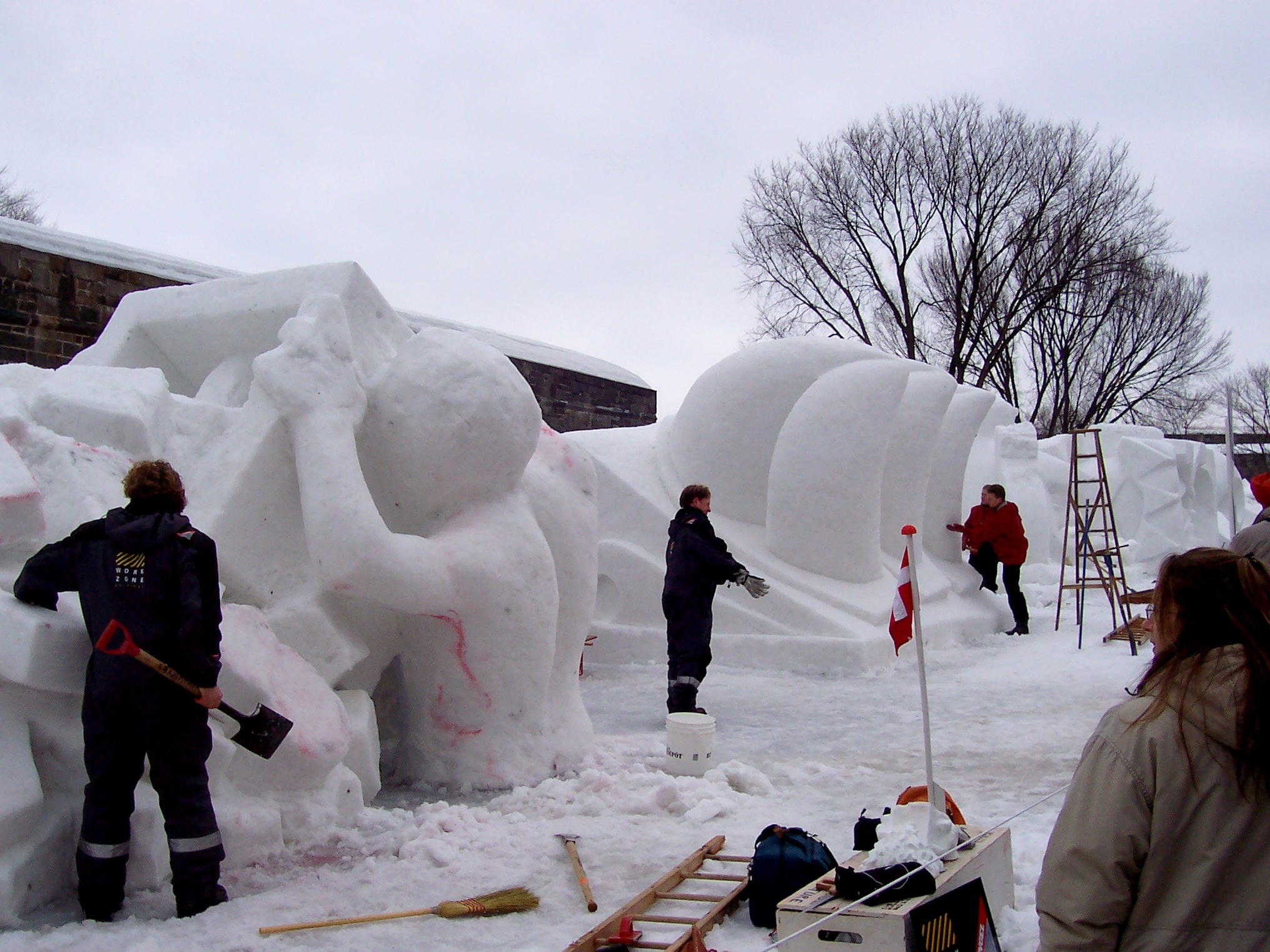 Internationale de la sculpture sur neige, les sculpteurs en action - Carnaval d'hiver de Québec (2006-02) International competition of snow sculpture, sculptors at work - Quebec City winter carnival (2006-02) Photo par / taken by Boréal (User:Boréal)